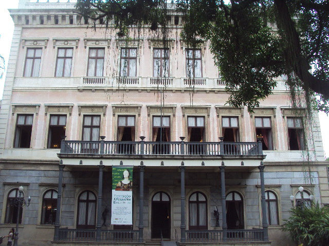 Mansão do Palácio do Catete, cidade do Rio de Janeiro, Brasil.